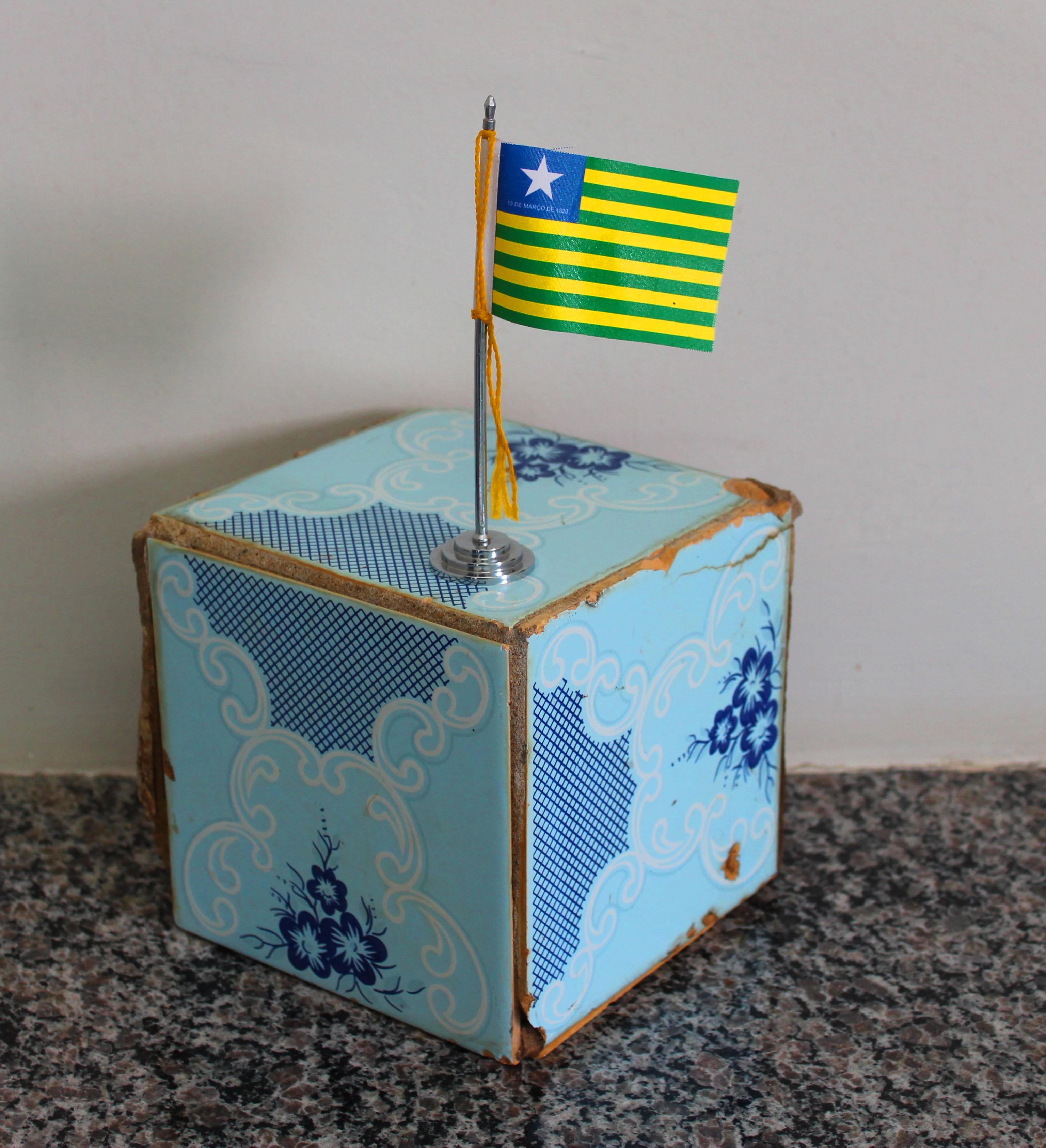 Minia bandeira do estado brasileiro do Piauí numa base de azulejo antigo.